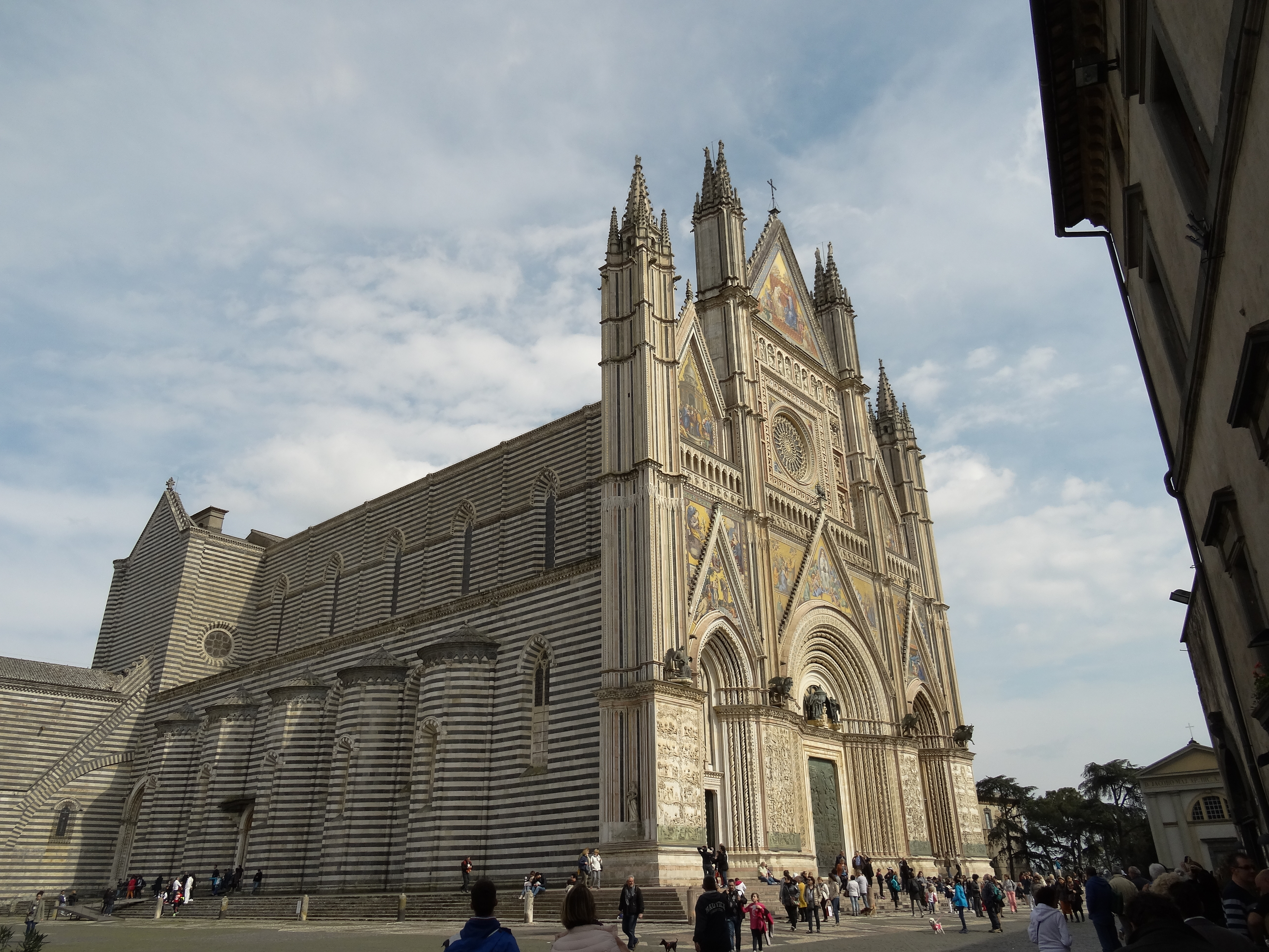 Orvieto